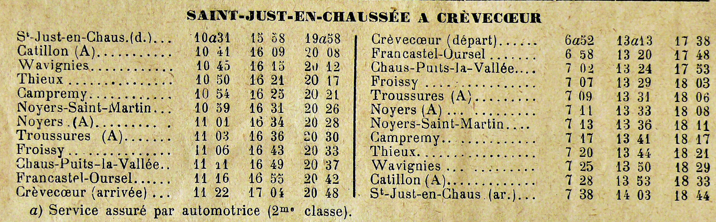 Tableau horaire de la section Saint-Just - Froissy - Crèvecœur-le-Grand Ligne Estrées-Saint-Denis - Froissy - Crèvecœur-le-Grand le Grand, publié dans la Tribune de l'Oise des 5/6 juin 1938 conservée aux archives départementales de l'Oise (5sp695)